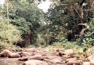 La Trilla, Rio Ocumare, Aragua - Venezuela